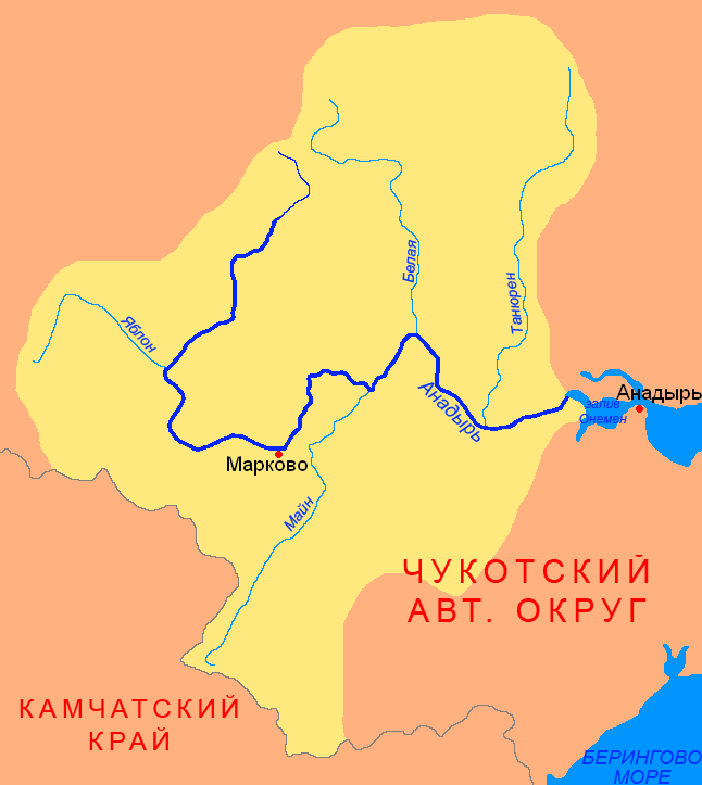 Схема бассейна реки Анадырь